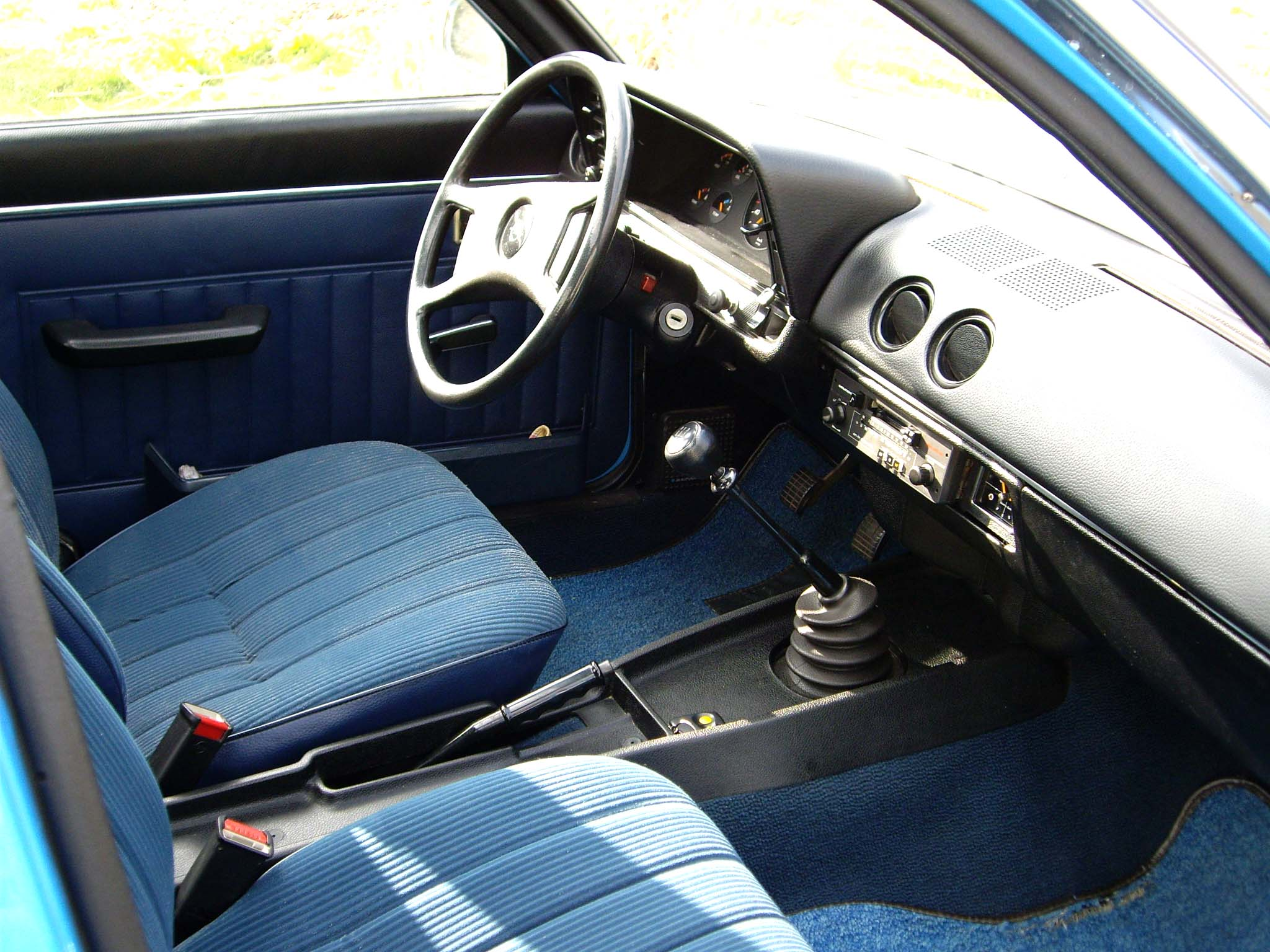 Ascona B 1,6N SR innen